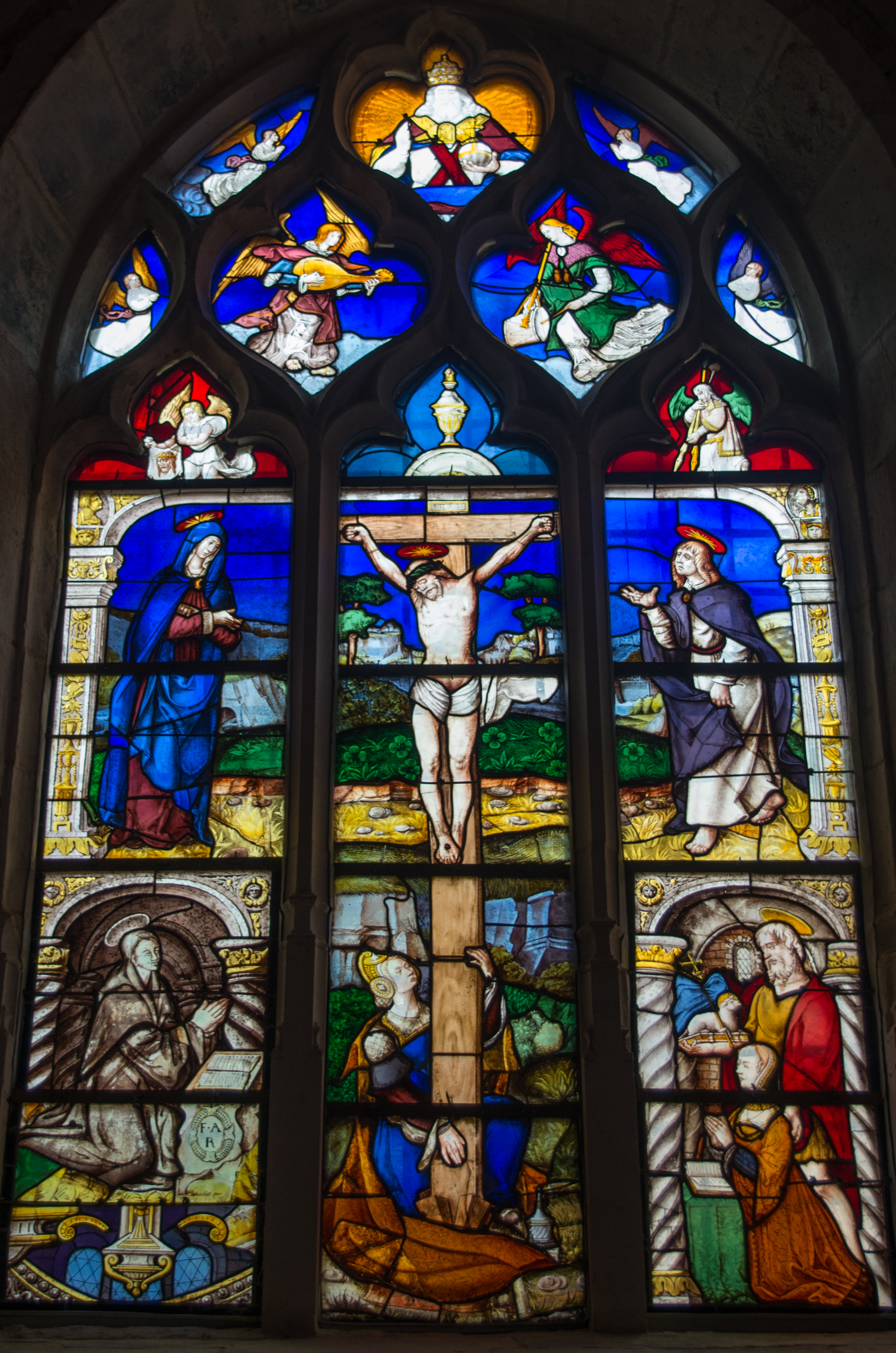 Eglise Notre-Dame de Torcée-en-Vallée